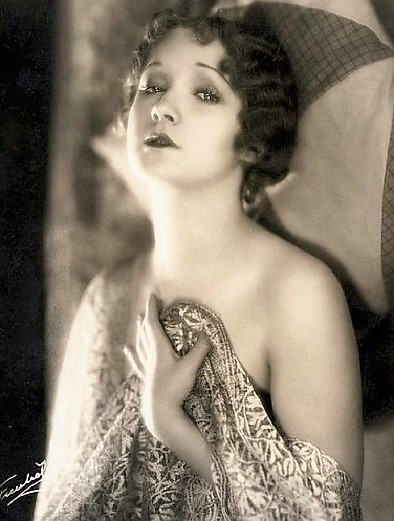 Helen Foster